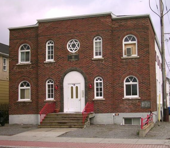 Ancienne Synagogue de Rouyn-Noranda